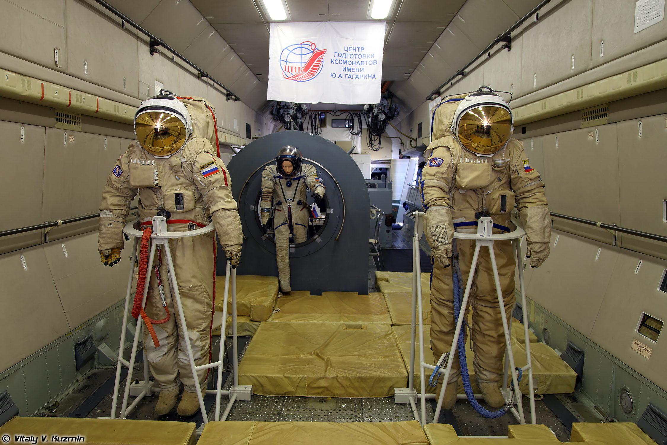 Ilyushin Il-76MDK